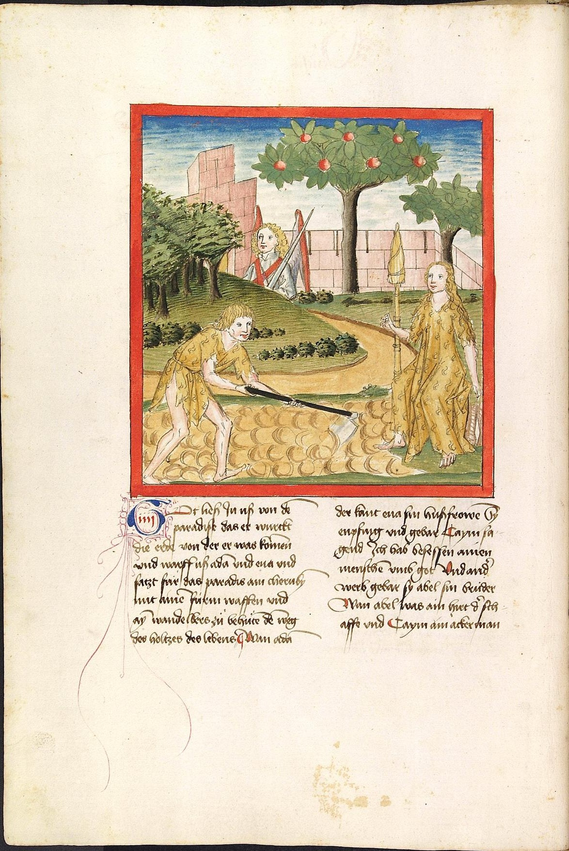 Codex Palatinus germanicus 16, Blatt 13v - Bibel, Altes Testament, Genesis: Die ersten Menschen bei der Arbeit außerhalb des Paradieses, Adam bei der Feldarbeit, Eva mit Spinnrocken und Spindel. (Cpg 16 = Bibel AT, deutsch, Bücher Mose, Josua, Richter, Ruth)